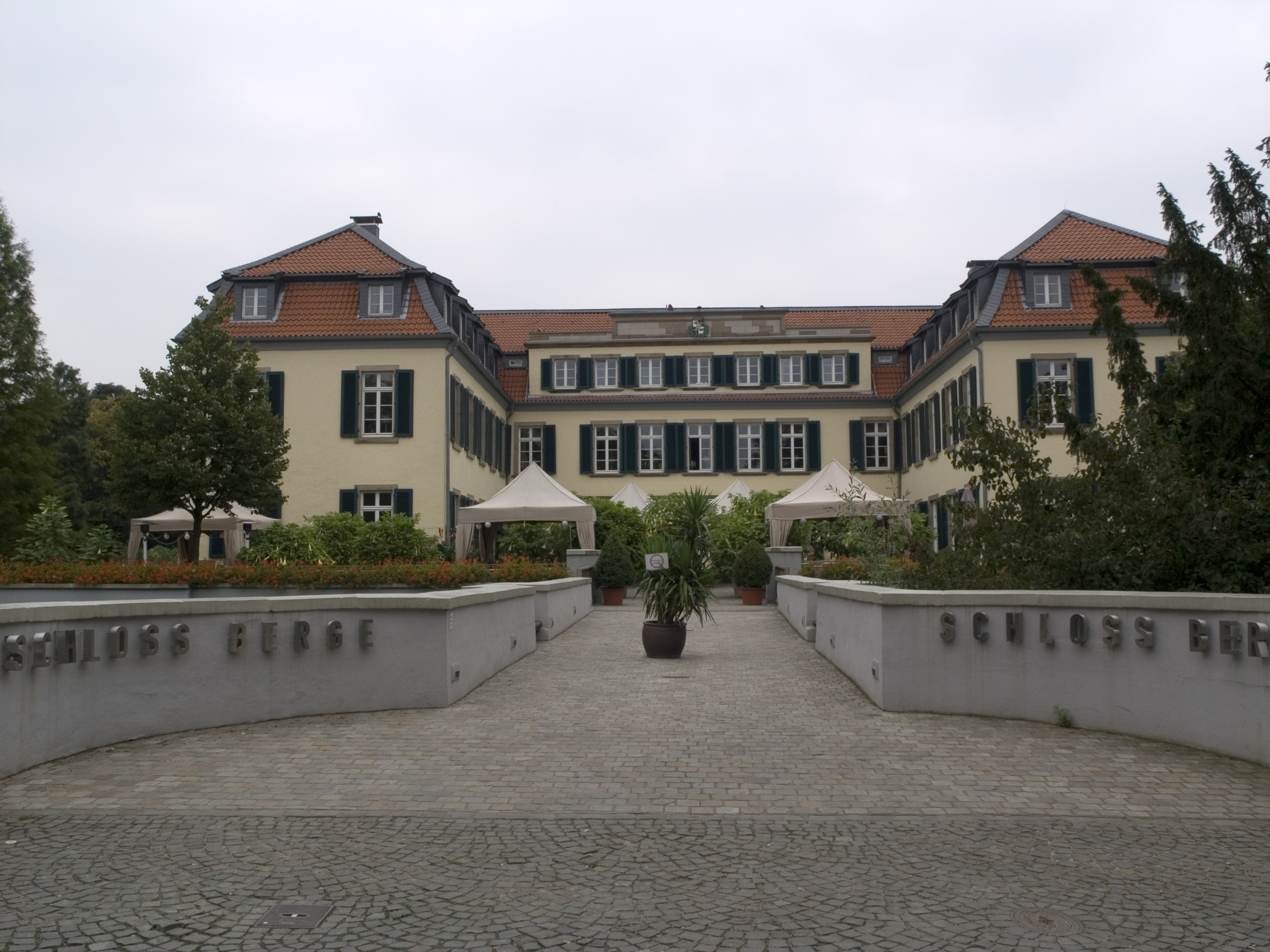 Северный Рейн - Вестфалия, Гельзенкирхен - замок Берге